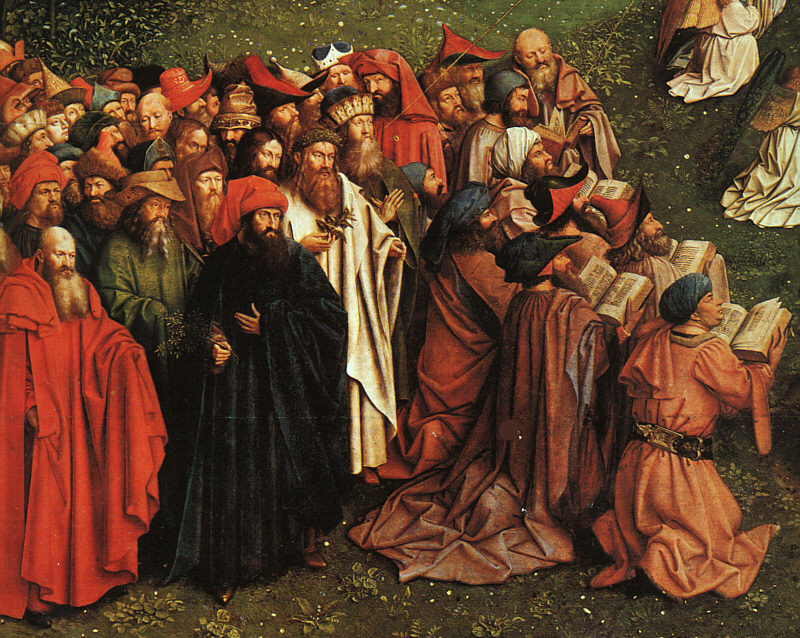 Jan van Eyck (ca. 1390-1441) retaule de l'Anyell místic, Gant (Flandes)